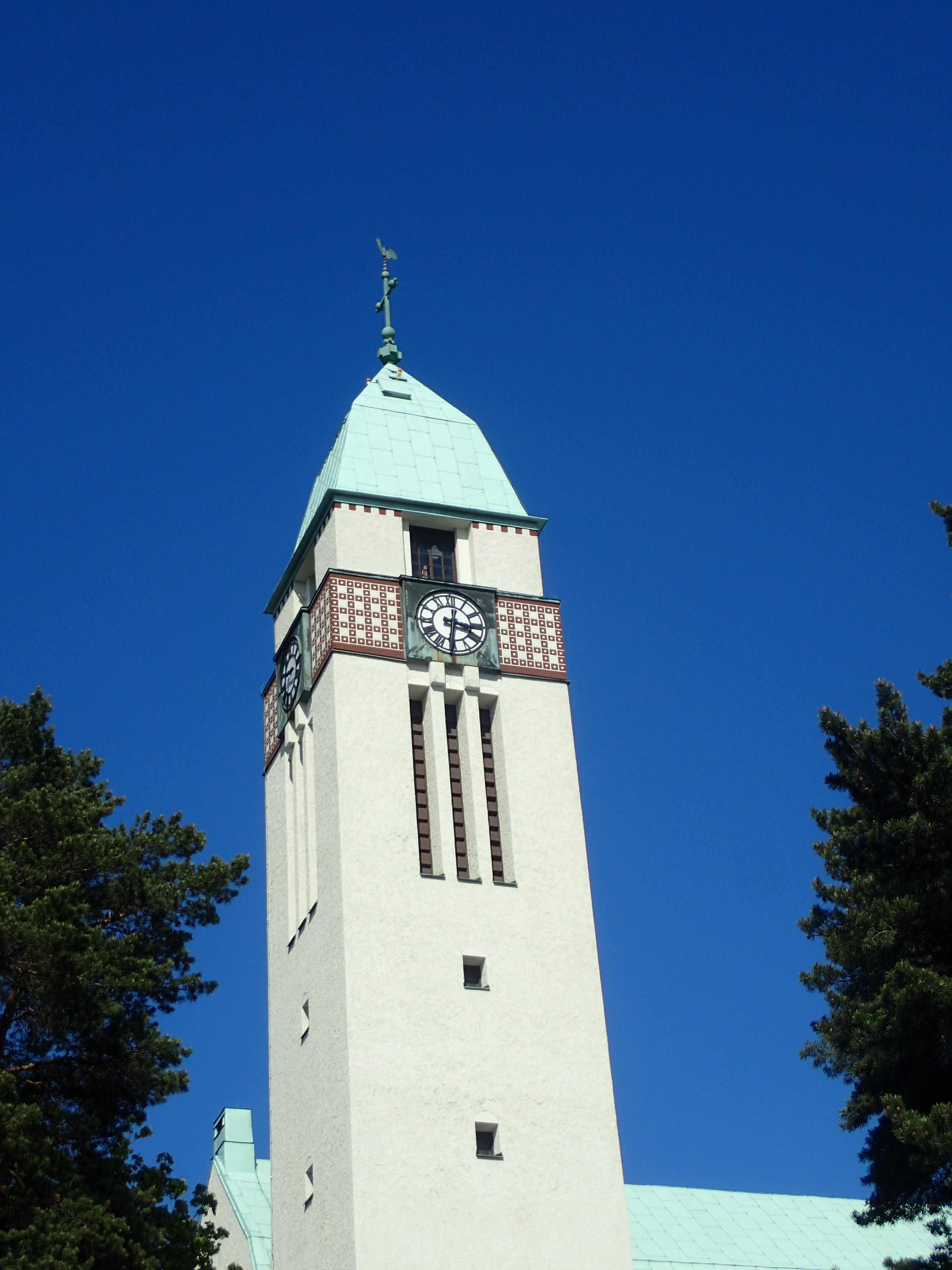 Sundbybergs kyrka, uppfördes efter ritningar av arkitekt Axel Sjögren och invigdes 1911